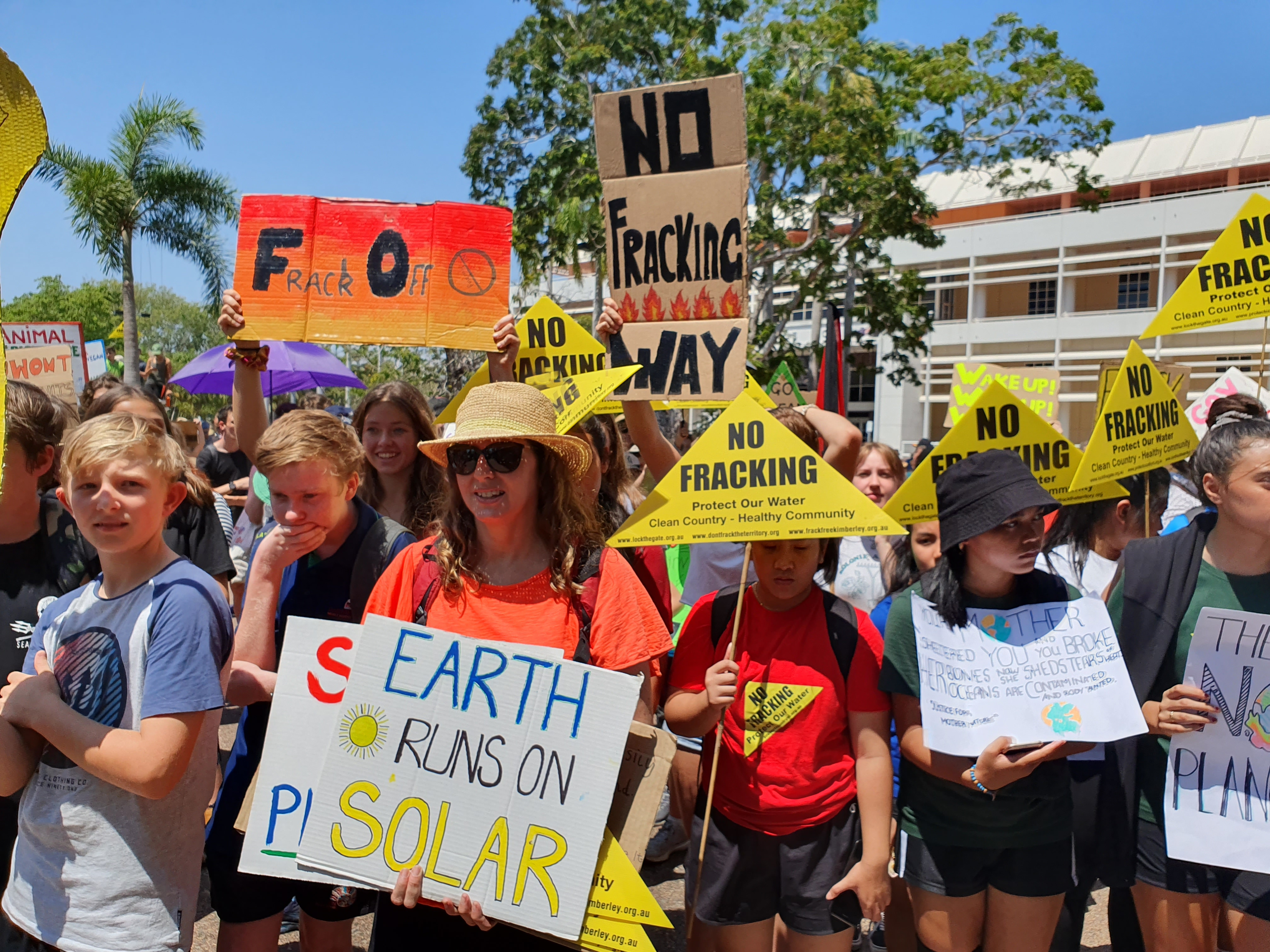 Darwin - Lauren Mellor